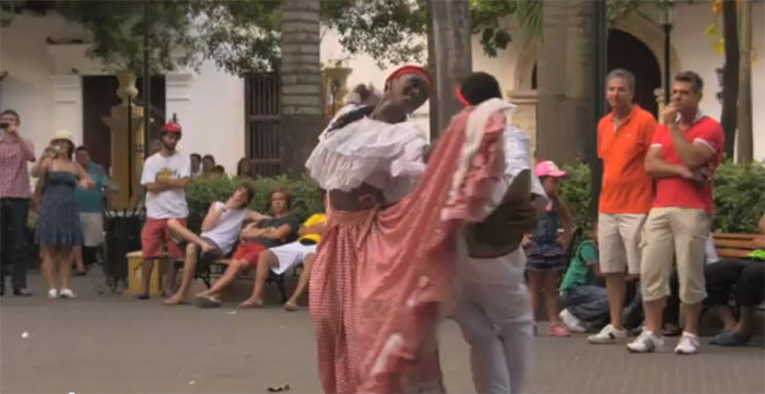 רקדנים רוקדים את ריקוד הקומביה